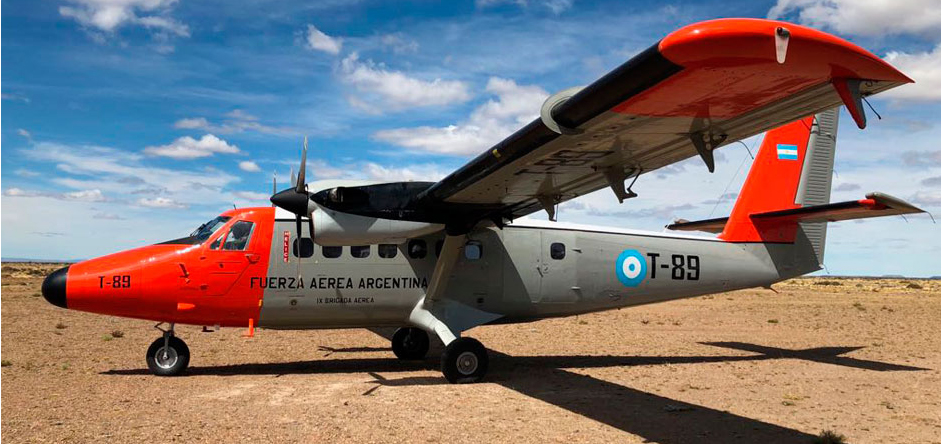 El Ministerio de Defensa informa que Líneas Aéreas del Estado (LADE) reanudó sus vuelos entre las ciudades de Comodoro Rivadavia y Río Mayo, en la provincia de Chubut, con una frecuencia de dos veces por semana. El servicio no tiene como fin obtener una rentabilidad económica sino atender a las necesidades de transporte de los lugares más alejados y carentes de medios rápidos. Es que LADE es el único Organismo Estatal de Transporte Aéreo de Fomento que depende de la Fuerza Aérea Argentina y del Ministerio de Defensa de la Nación y que tuvo su origen en el deseo y la necesidad de emprender una acción comunitaria que uniese los centros de mayor densidad poblacional con los pueblos alejados y carentes de medios rápidos. El servicio entre ambas ciudades de Chubut se reanudú la semana pasada con vuelo inaugural que realizaron el director general de LADE, comodoro Fabián Vidal Arbeletche, y el director operativo, comodoro Daniel Klecha. La conexión se lleva a cabo con un DHC-6 Twin Otter, que cuenta con una capacidad máxima de siete pasajeros a la ida y diez a la vuelta y con una frecuencia de dos veces por semana: martes y jueves a las 9 desde Comodoro Rivadavia a Río Mayo.